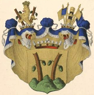 Stackelbergi suguvõsa vabahärravapp (Haljava liin)